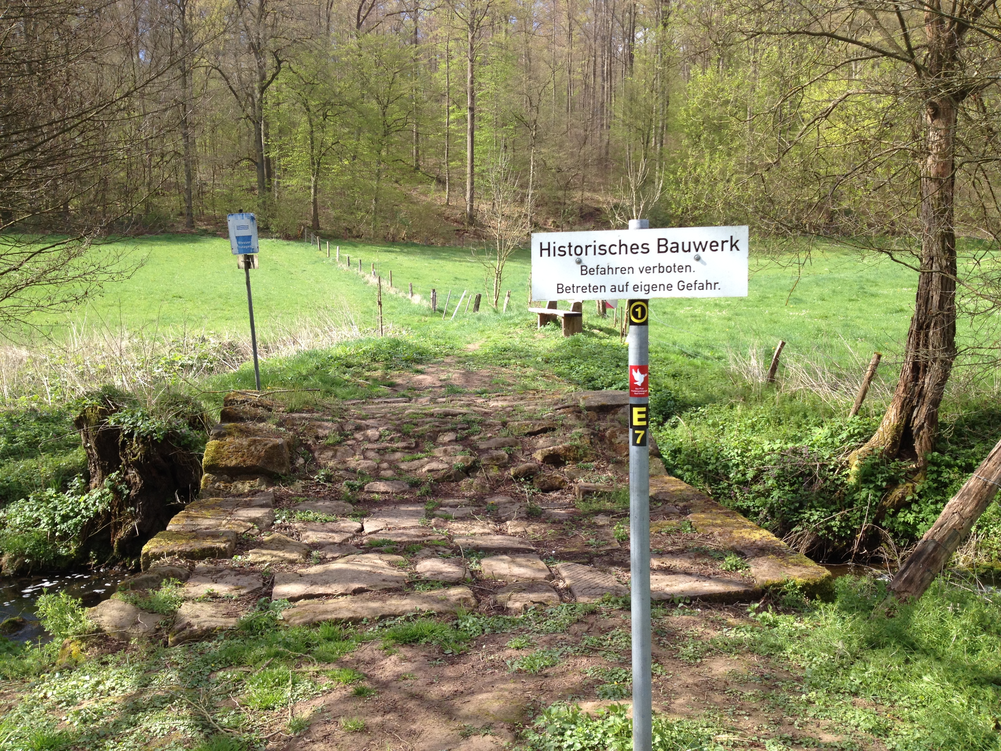 Die Kurfürstenbrücke im Emstal zwischen Merxhausen und der Weißenthalsmühle. Über die Brücke führen der Eco Pfad Friedenspädagogik Bad Emstal, der Rundweg 1 (vom Parkplatz Wiesentahlmühle aus) und der Rundweg E7.